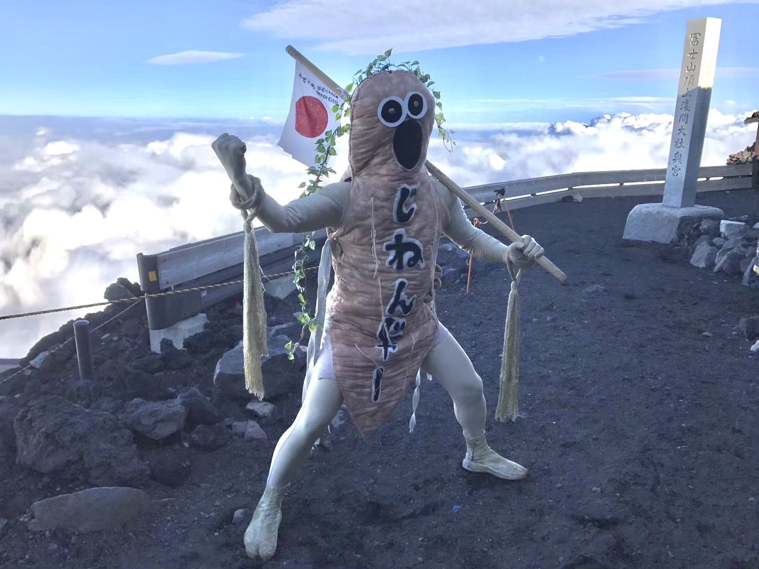 2017年9月3日 富士山頂にて